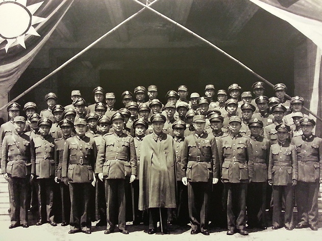 中文（中国大陆）: 蒋中正视察沈阳